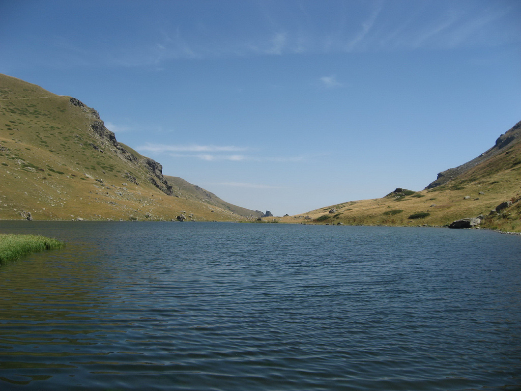 Боговињско езеро на Шар Планина